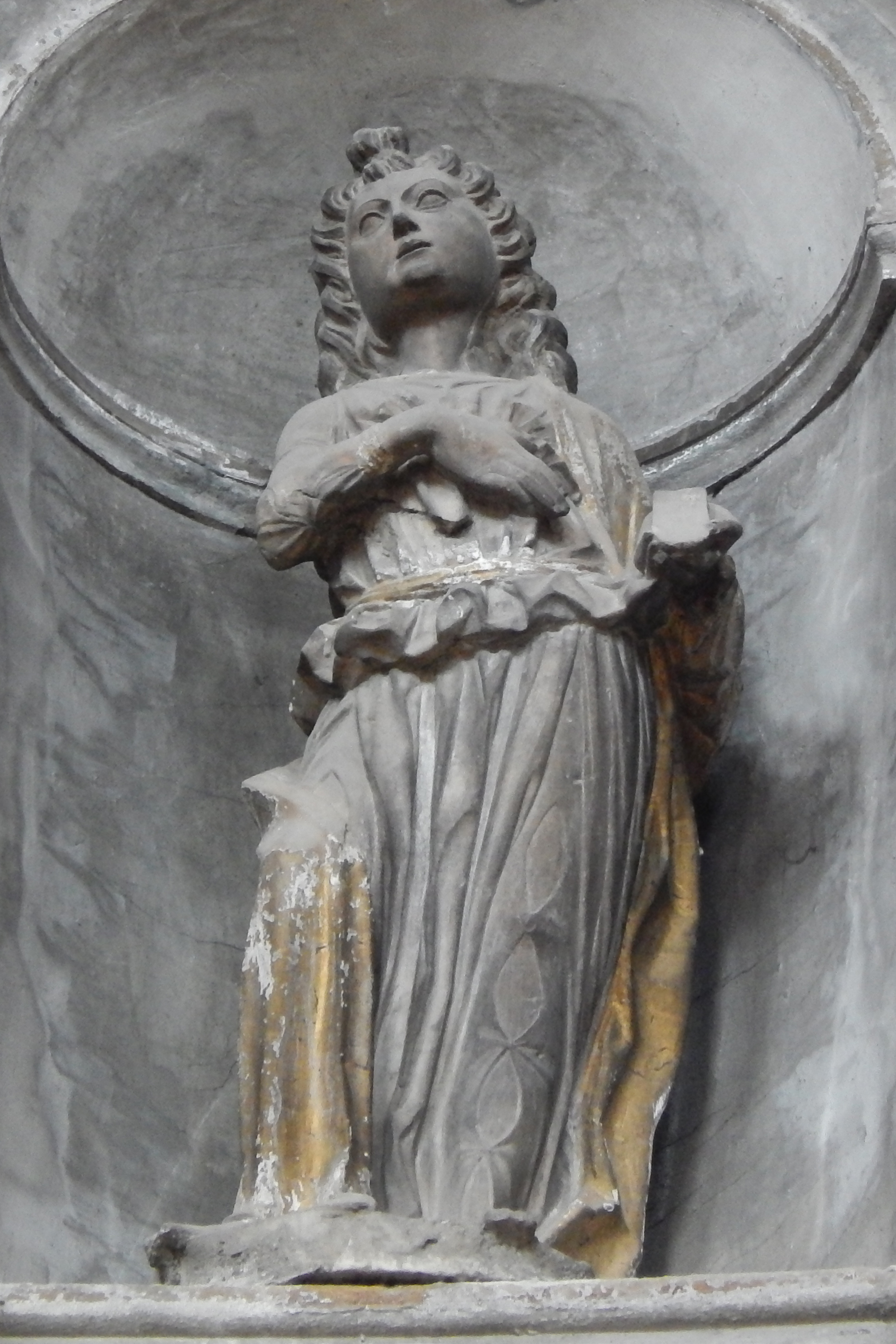 Angelo, 1489, Antonio della Porta (Tamagnino), chiesa di Santa Maria dei Miracoli, Brescia